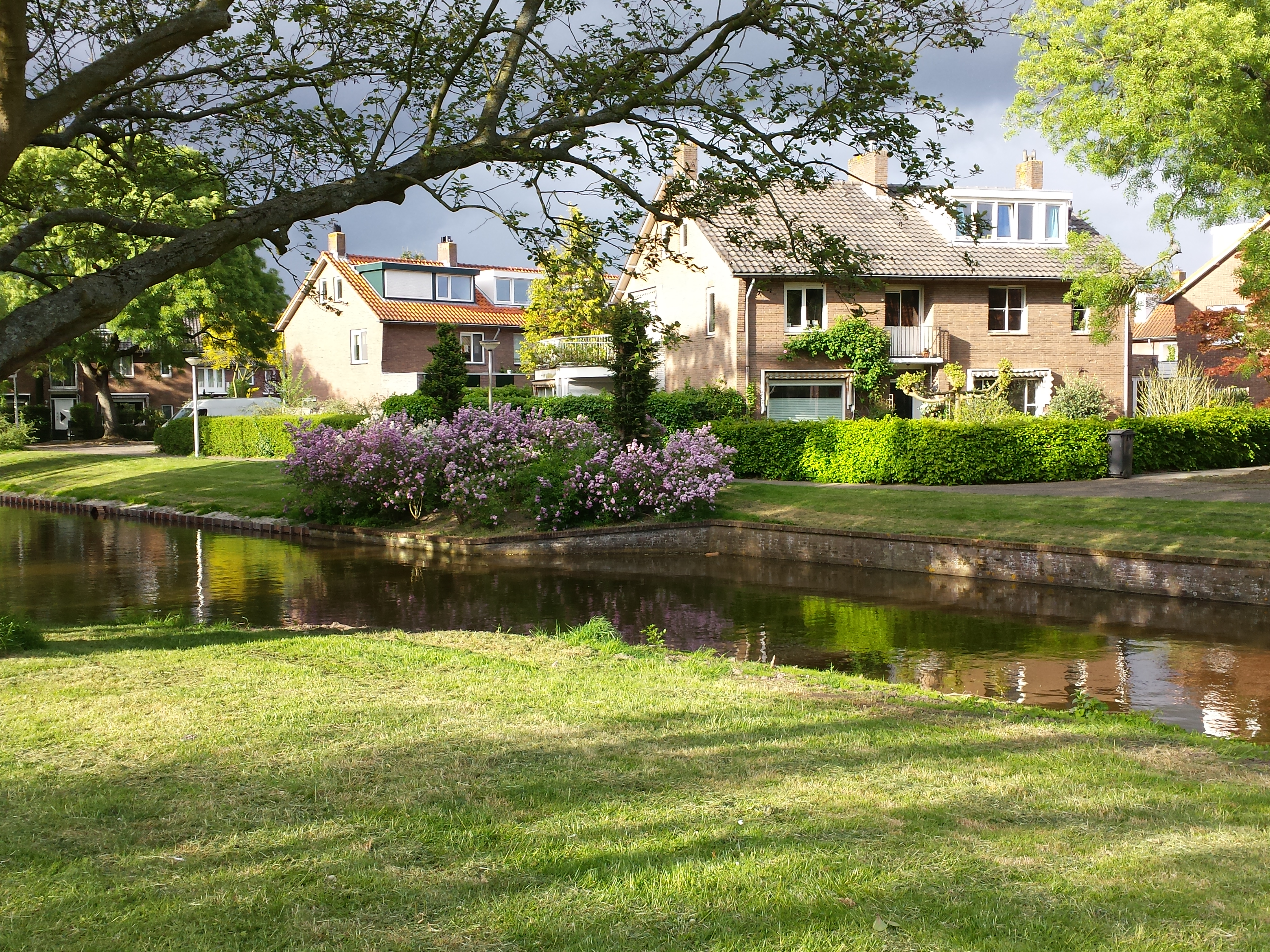 Elsrijk, 1181 Amstelveen, Netherlands